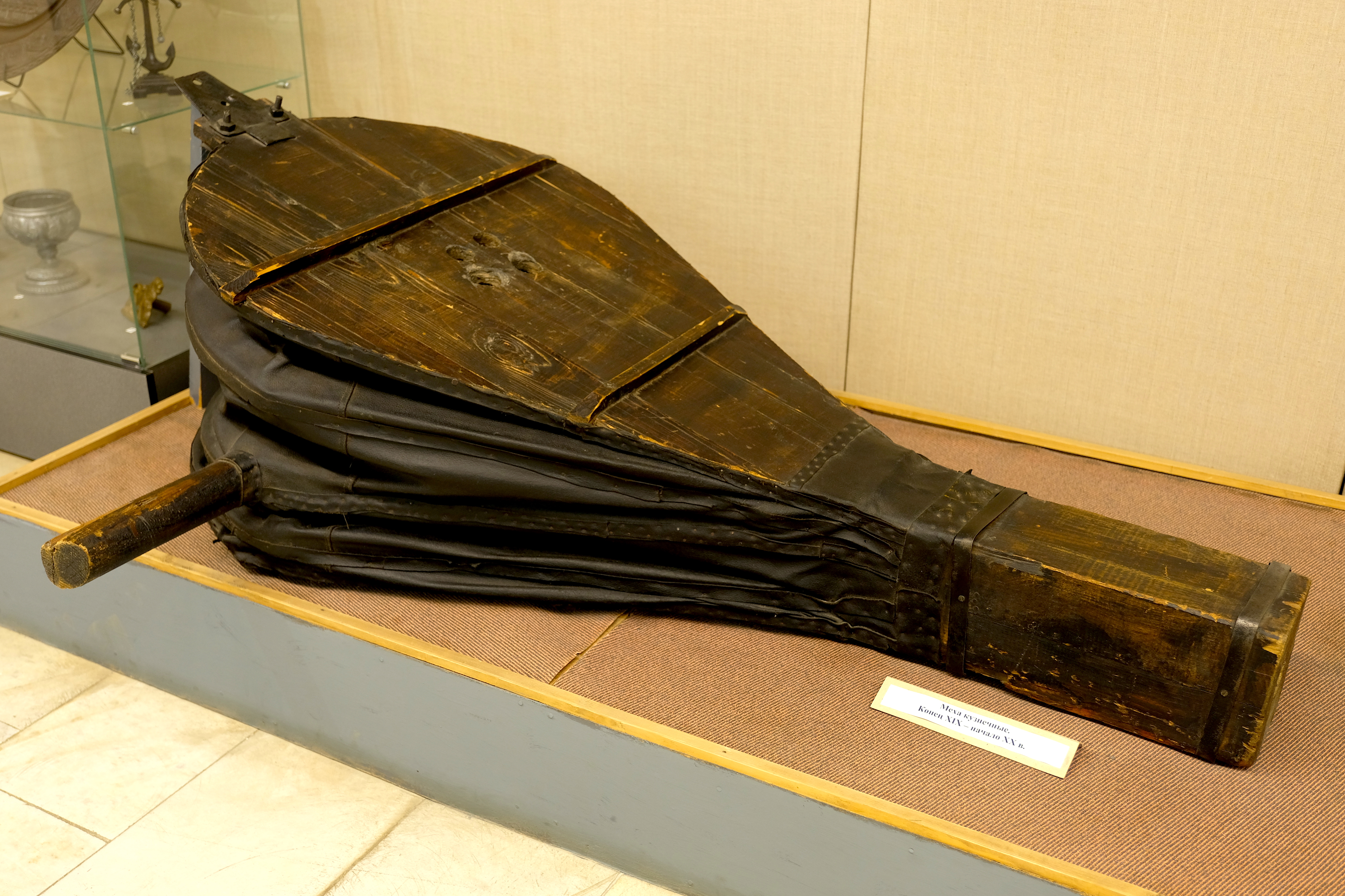 Экспозиция Национального музея Удмуртской Республики имени Кузебая Герда: кузнечные меха